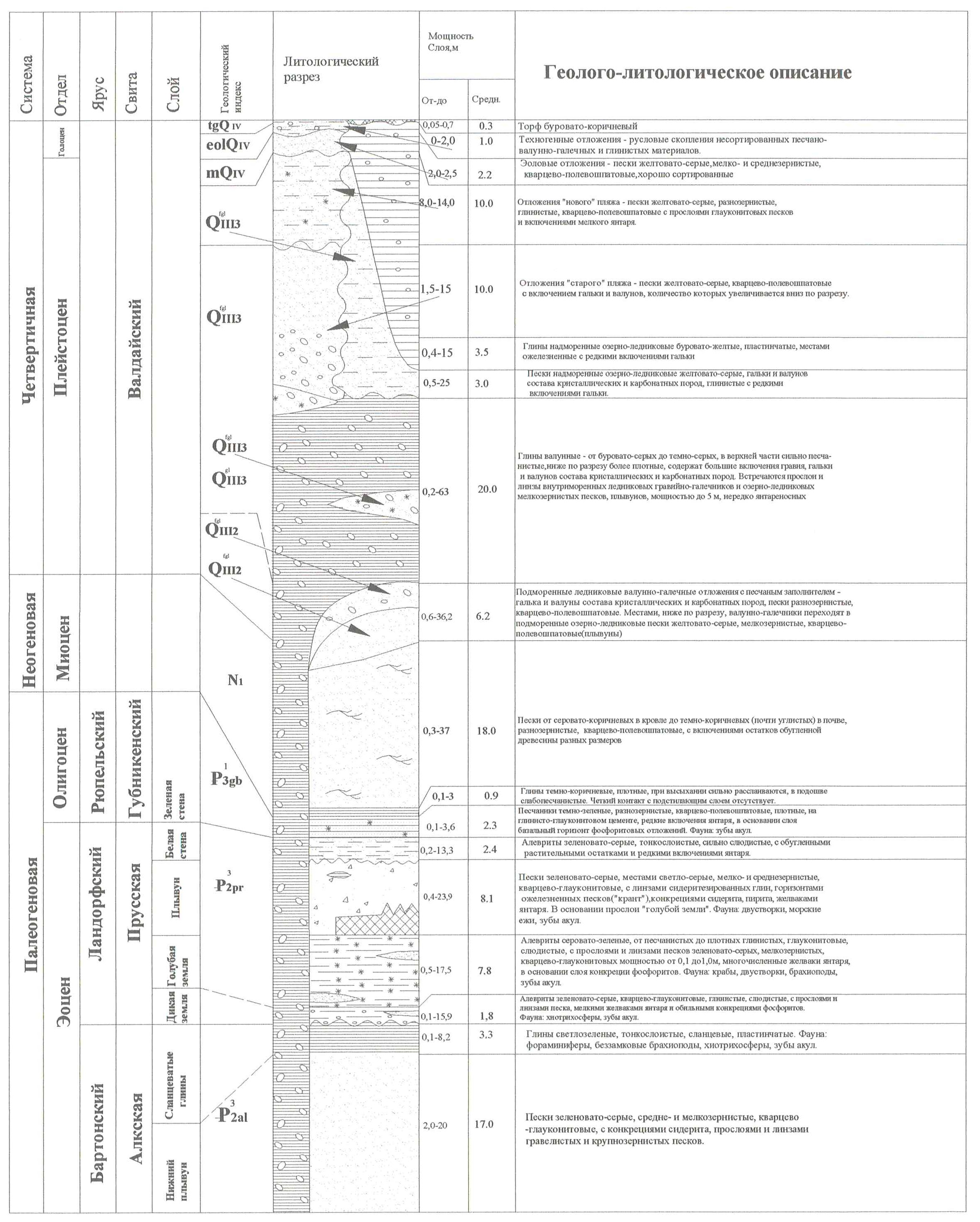 Сводная литолого-стратиграфическая колонка Приморского месторождения янтарного комбината.